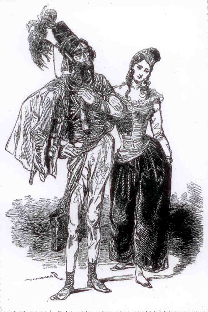 Un couple de Parisiens en Carnaval, la femme est en débardeur.